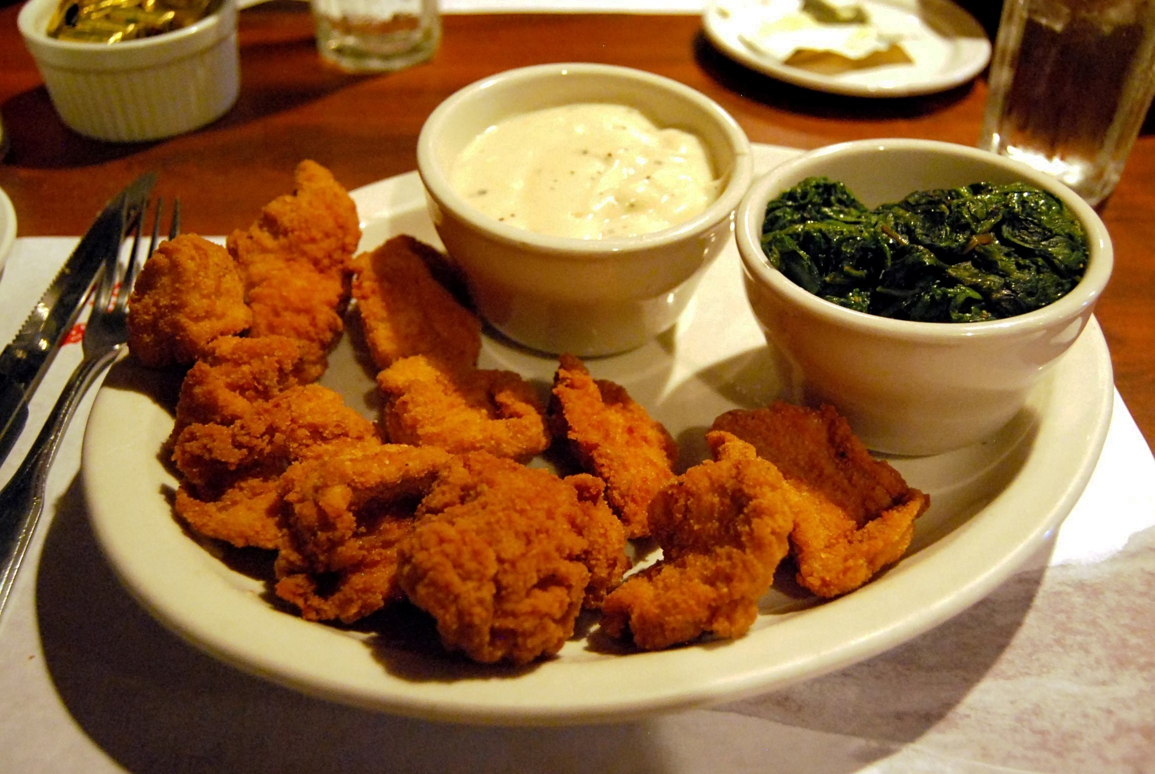 Lamb fries are fried lamb testicles.